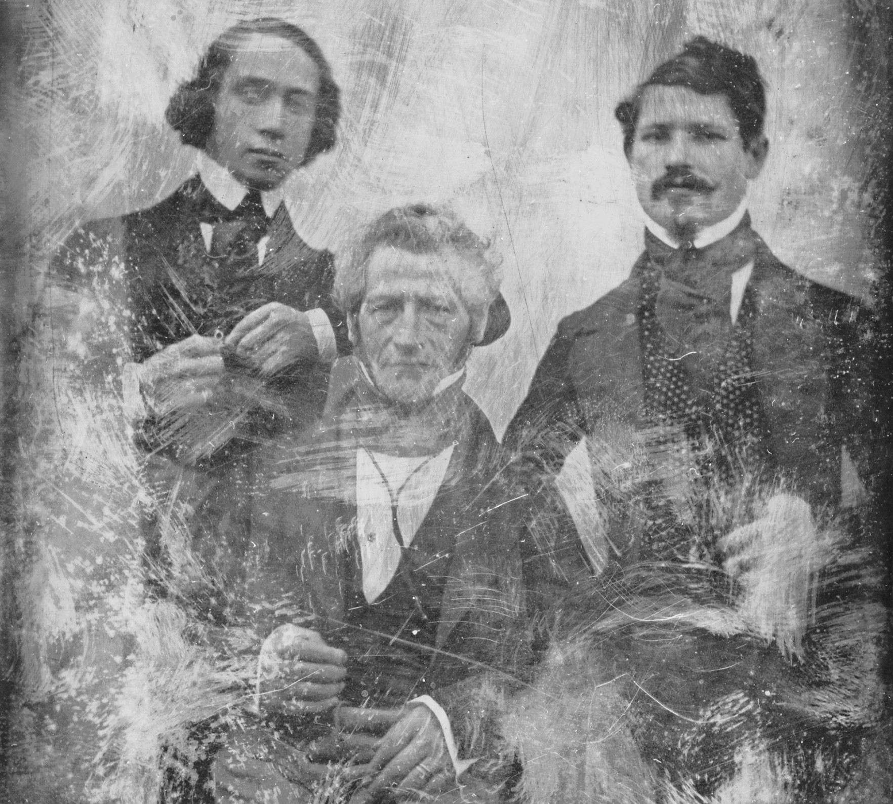 Porträtt (Daguerreotypi) visande Industriidkaren Salomon Ludvig Lamm (1786-1857) med sönerna Jacques (1817-1891) och Martin (1824-1878).